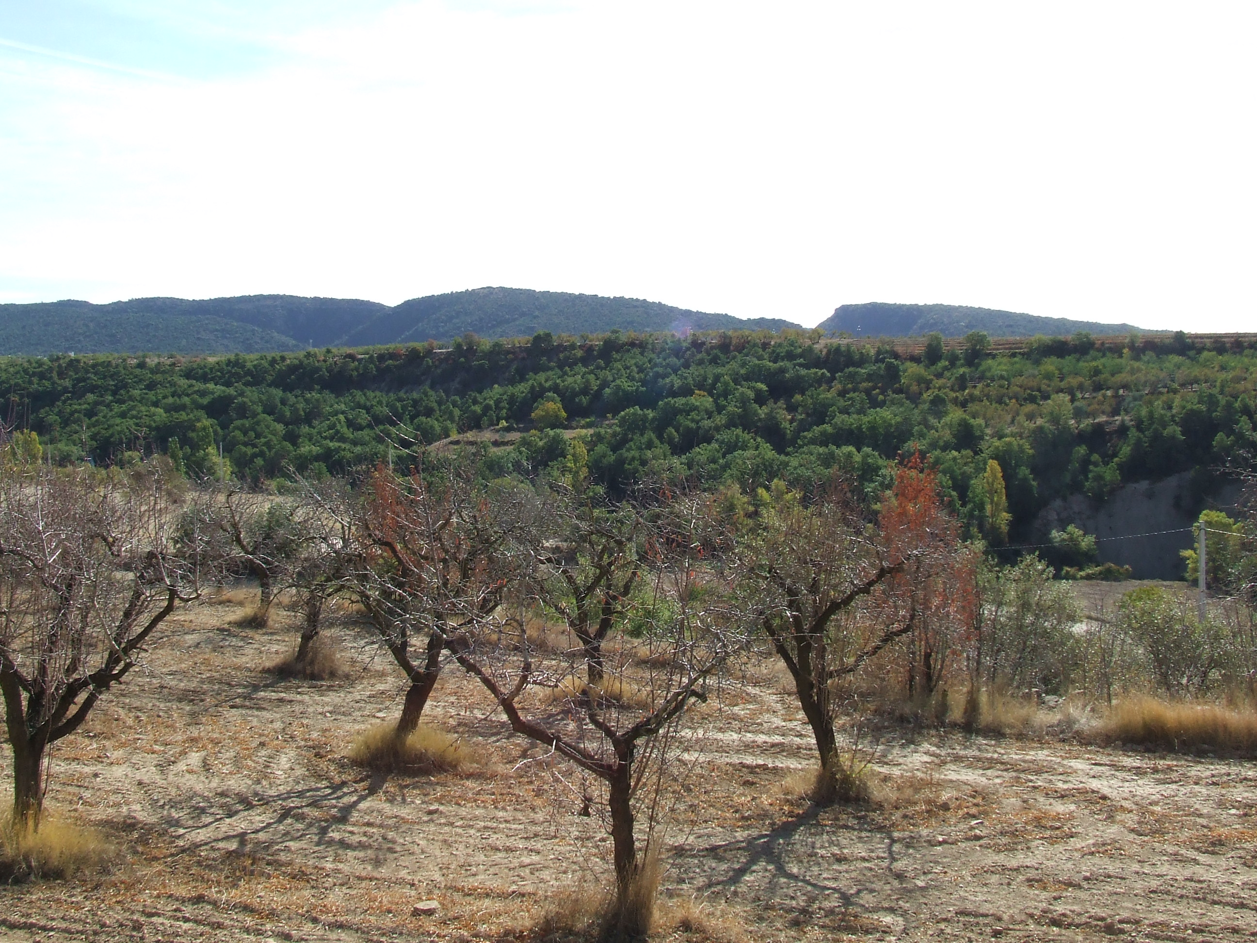 Els Obagots (Abella de la Conca, Pallars Jussà)